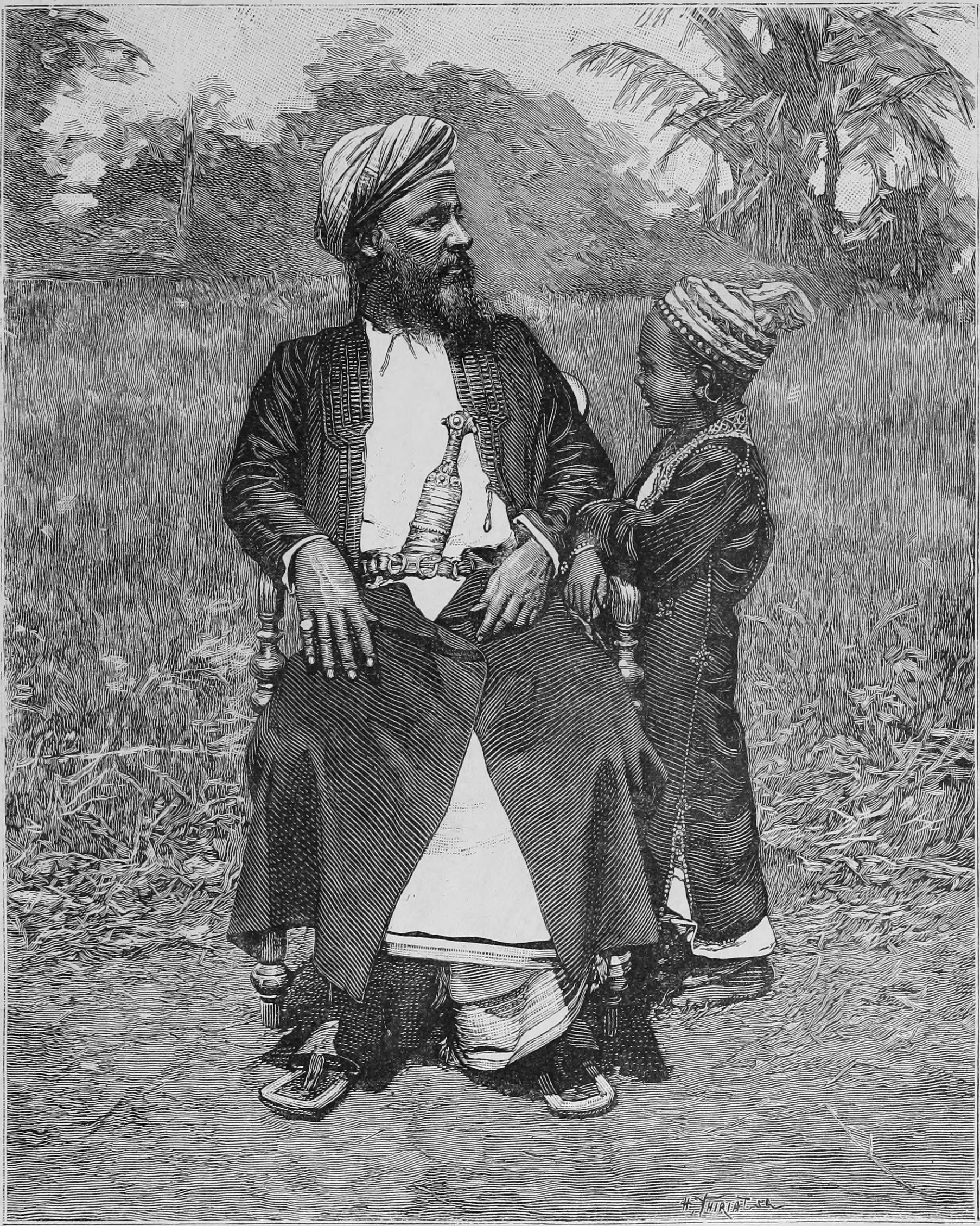 Zanzibari muslim